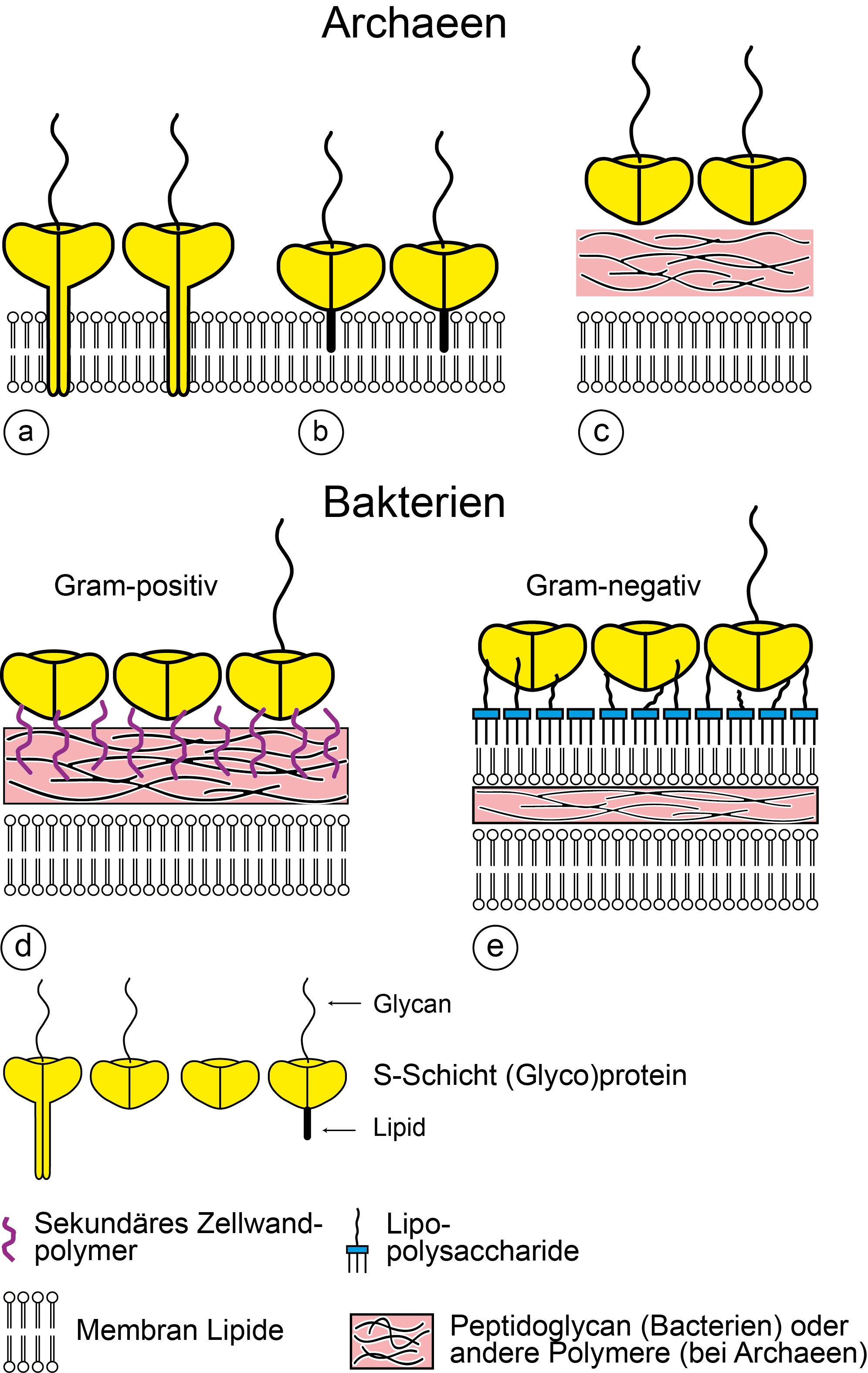 Schematische Abbildung der häufigsten supramolekularen Architekturen der Zellwände prokaryontischer Mikroorganismen mit S-Schichten.